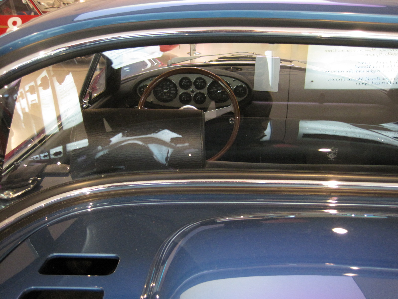 Automobiles in the Galleria Ferrari - Dino 206 GT V6 - 1967